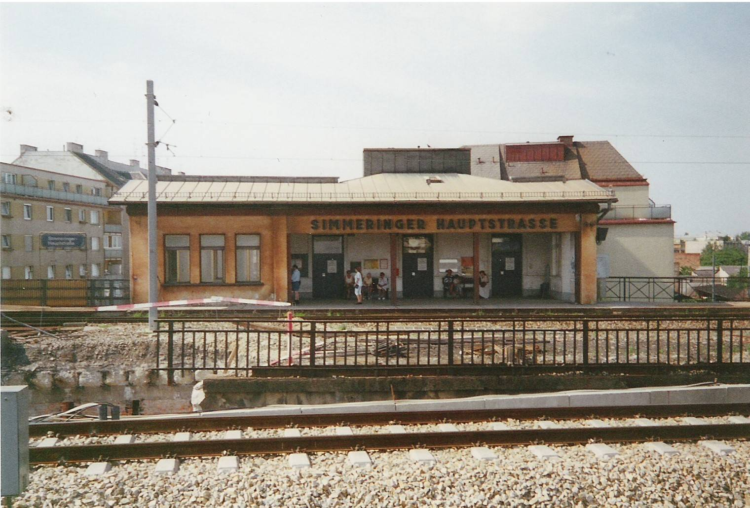 de: Haltestelle Simmeringer Hauptstraße en: Station Simmeringer Hauptstraße